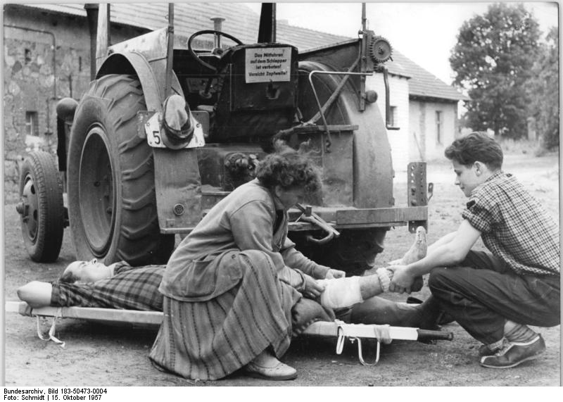 Gussow, Unfallübung Zentralbild Schmidt Weiß-Ho. 15.10.1957 Bäuerin, Mutter, Volksvertreterin Von den 450 Einwohnern der Gemeinde Gussow, Kreis önigs-Wusterhausen wurde die Bäuerin Anneliese Gaensicke zu ihrer Volksvertreterin gewählt. Im Gemeinderat arbeitet sie auf dem Gebiet des Wohnungs- und Sozialwesens. Vielen Bewohnern hat sie seitdem schon helfen können. So hat sie z.B. den erkrankten Frauen die Sorge um ihre Kinder und den Haushalt abgenommen, die Hilfe des Frauenausschusses organisiert, Wohnungstausch vermittelt, durch das NAW Möglichkeiten für neue Wohnungen geschafft. Frau Gaensicke wird besonders von älteren Bewohnern oft um Rat gefragt. Die Volksvertreterin ist selbst Mutter von 2 Kindern und arbeitet für ihre Eltern, die Genossenschaftsbauern sind, in der Frauenbrigade der LPG mit. Frau Haensicke will selbst Mitglied der LPG werden. Neben hiren Kindern und ihrem Haushalt versorgt sie noch das Vieh aus der persönlichen Wirtschaft ihrer Eltern. Trotzdem hat sie noch Zeit, jeden Dienstag im Volkschor Gussow mitzusingen. UBz: Frau Gaensicke ist in der Gemeinde auch Gesundheitshelfern. Bei einer Probe beweist sie, dass sie bei vorkommenden Unfällen Erste Hilfe leisten kann.